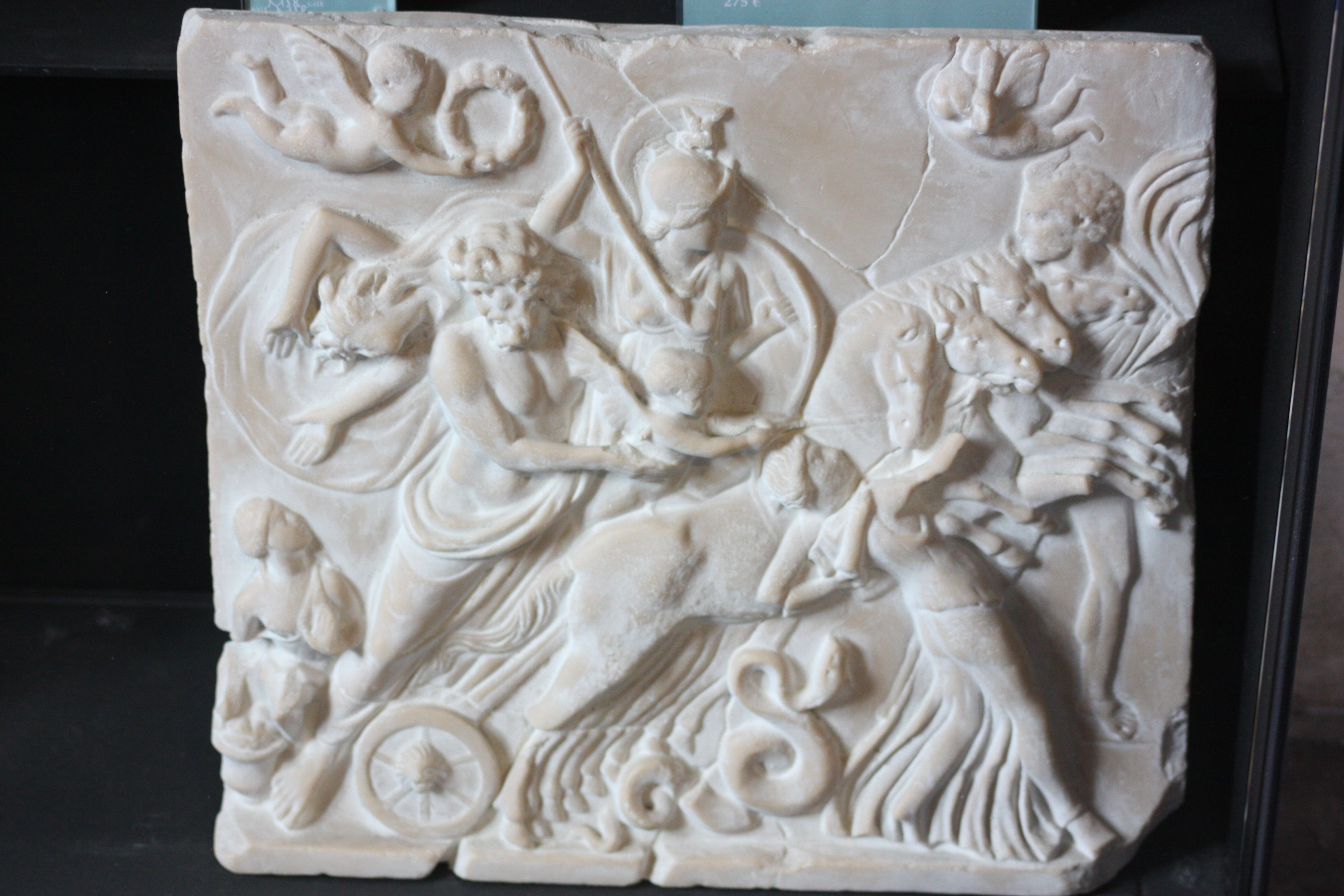 relief de l'enlèvement de Proserpine